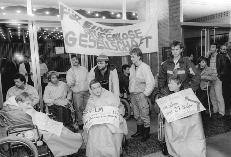 ADN-ZB Zimmermann 25.1.90 Berlin: Behindertendemonstration Zahlreiche Rollstuhlfahrer aus beiden Teilen der Stadt folgten dem Aufruf des DDR-Behindertenverbandes vor dem Kino "International" zur Premiere des Films "Rückwärts laufen kann ich auch" für ihre Rechte einzutreten. Unter der Losung "Gegen bauliche und geistige Barrieren - für zugängliche Menschen und Gebäude" forderten sie mit ihrer 20minütigen Blockade vor den Türen des Kinos, Behinderte nicht länger vom kulturellen Leben auszugrenzen. Das "International" zählt für sie zu den unzugänglichsten Filmtheatern und bietet im Saal nur vier Rollstühlen Platz, die über mehrere Treppenabsätze gewuchtet werden müssen.